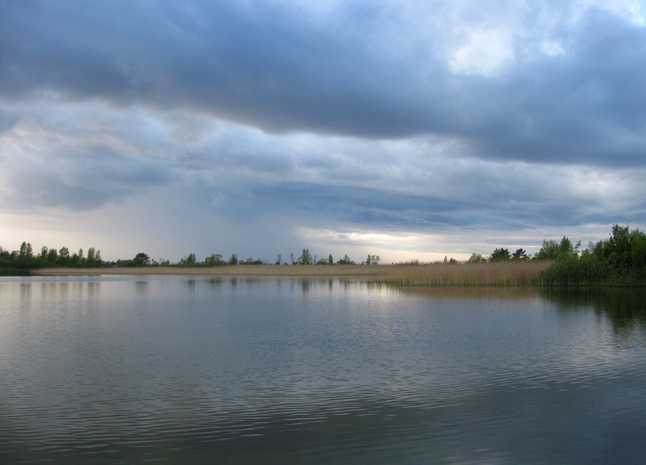 Pakri maastikukaitseala